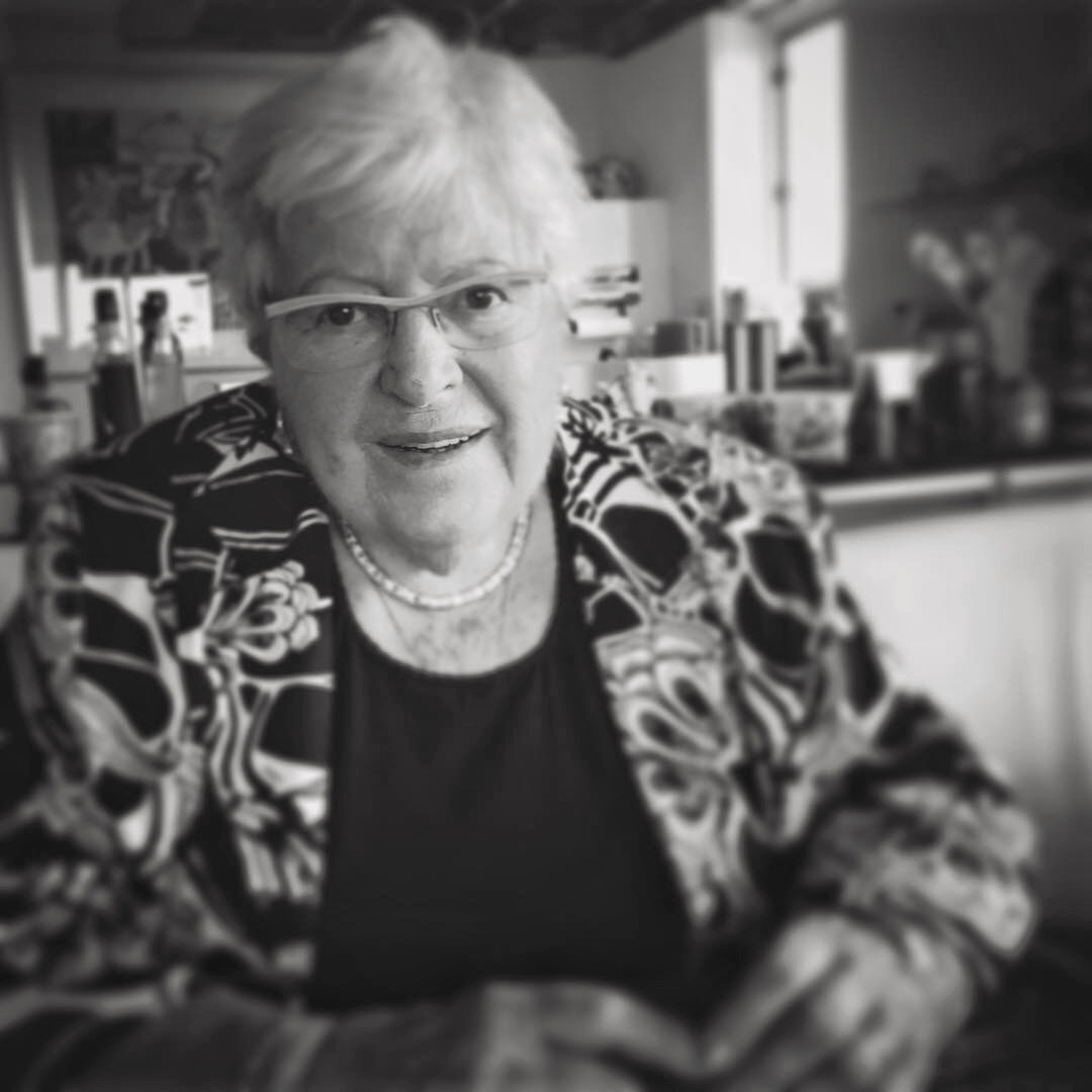 Wil Velders-Vlasblom